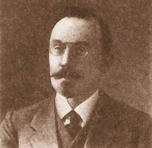 Жебелёв, Сергей Александрович